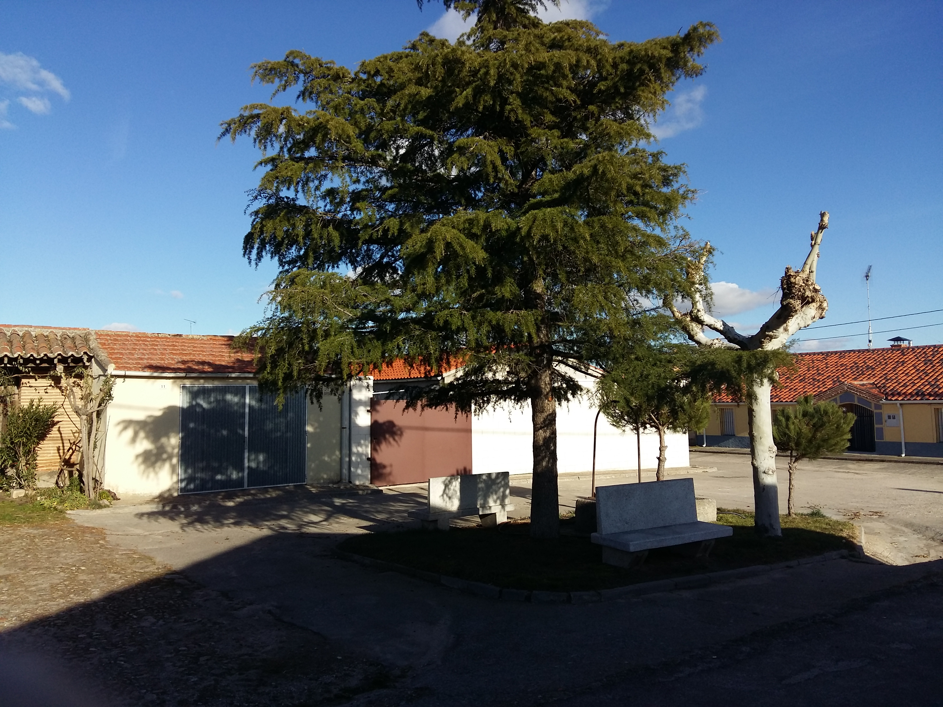 Situada al lado de la carretera principal que pasa por el pueblo